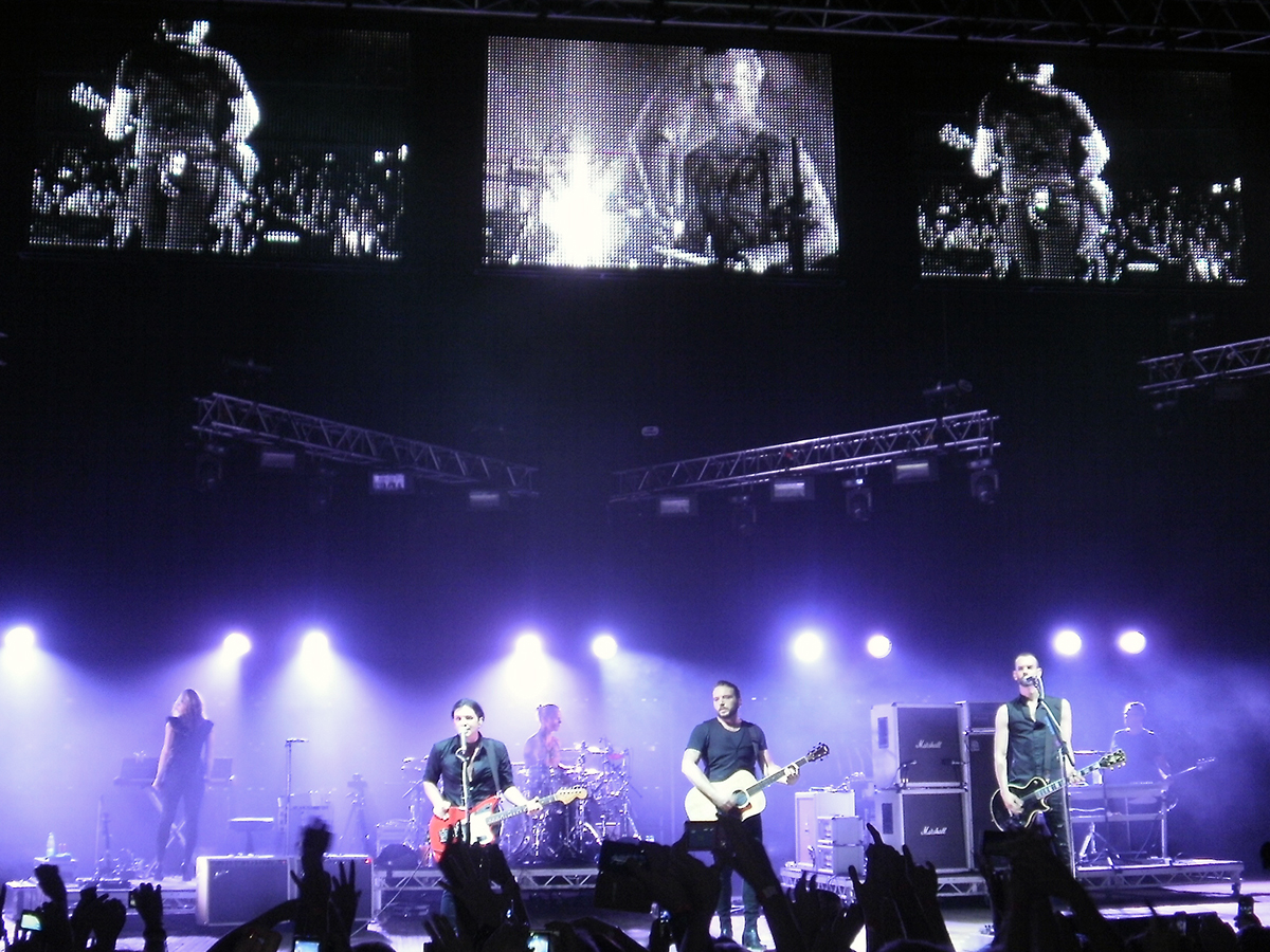 20/IX/2012